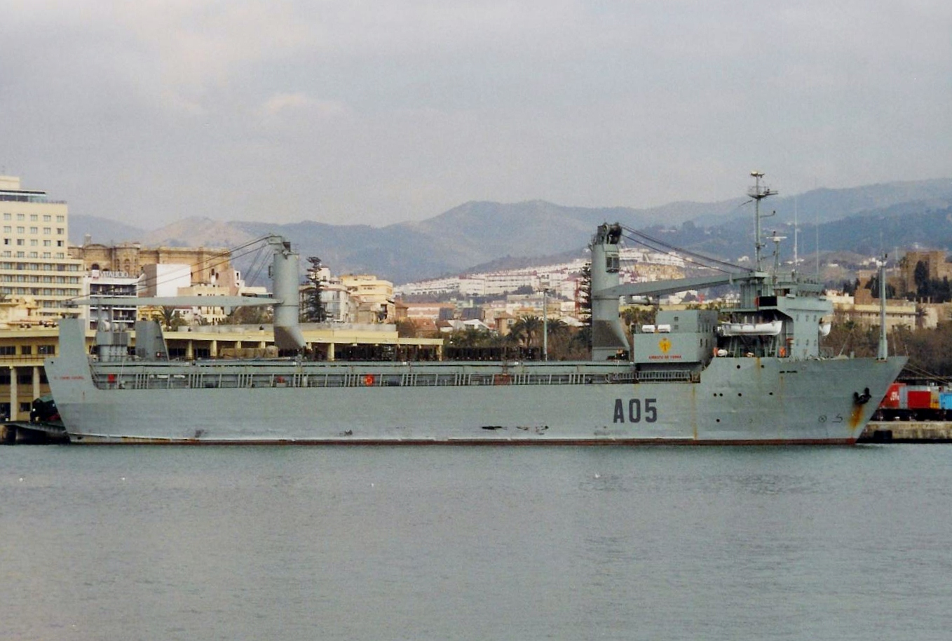 Buque de transporte de la Armada Española El Camino Español (A-05)